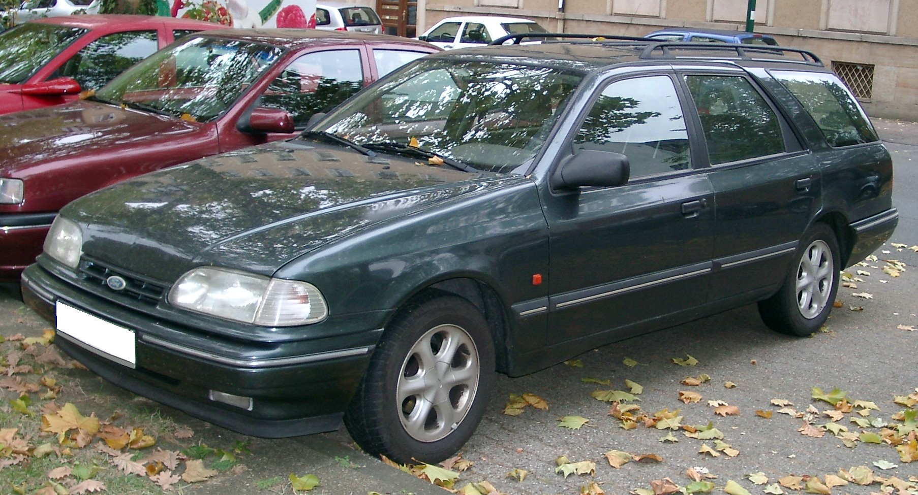 Ford Scorpio Turnier, 1. Generation